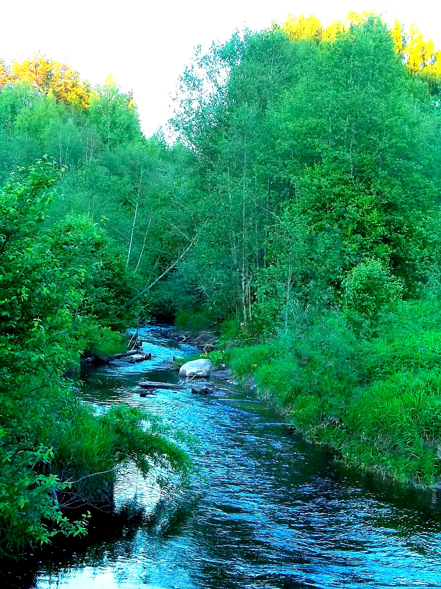 Устье реки Сара